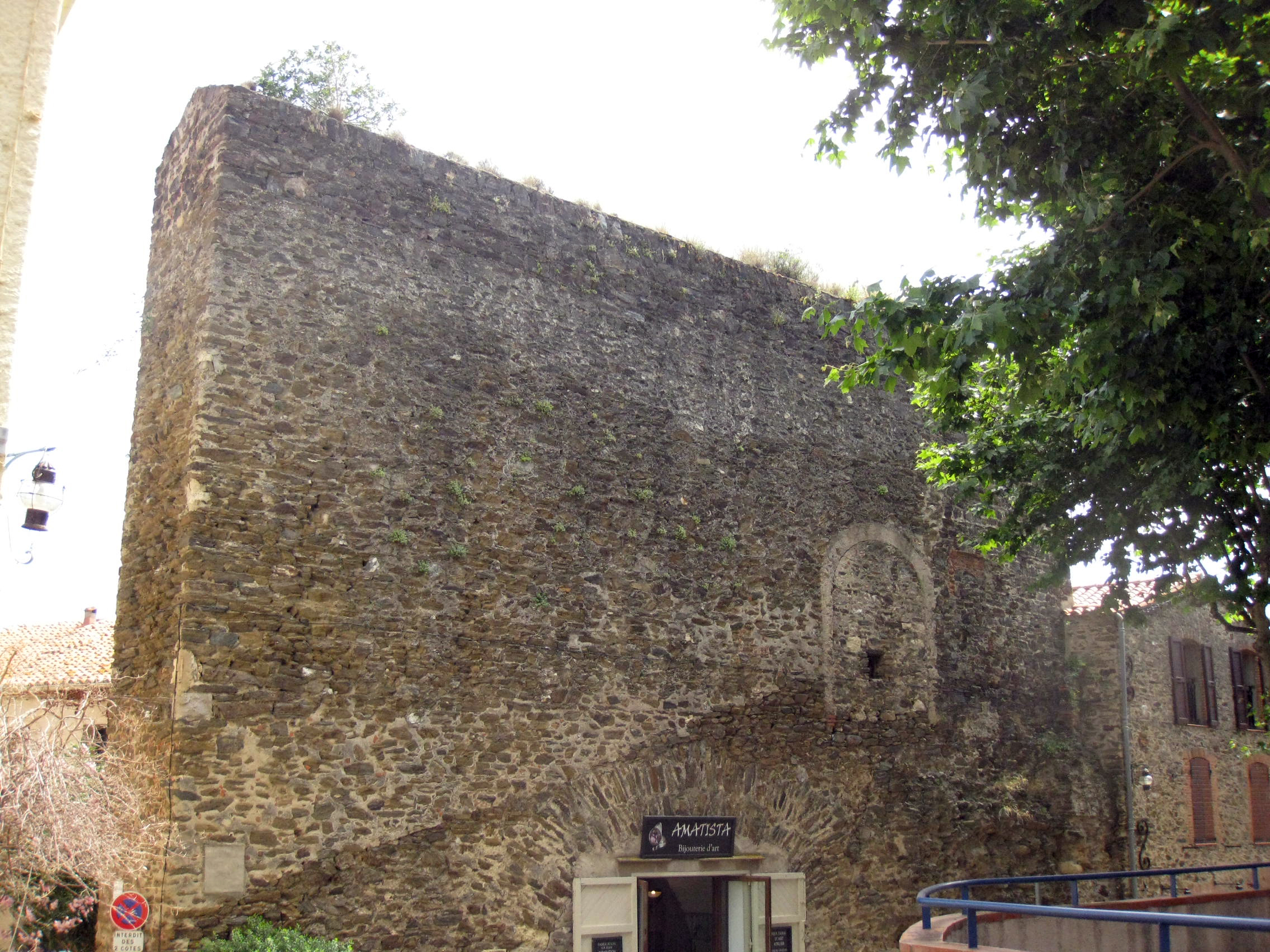 Fortificació de l'Artilleria i muralles (Cotlliure)